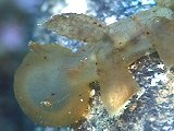 Melibe viridis, detalle de cabeza. Parque Marino de Izu, Japón.